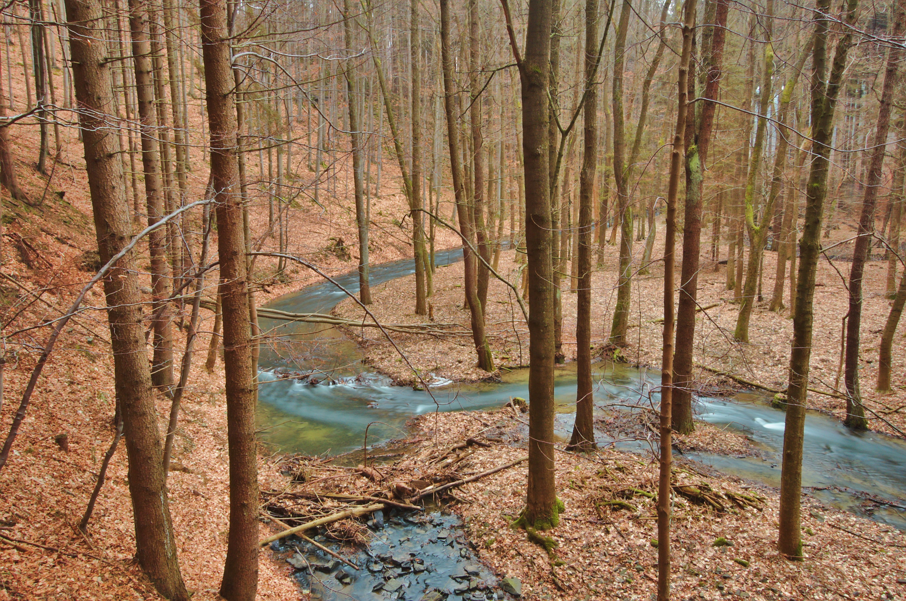 Zábrana v údolí mezi Lipovským mlýnem a Malým Hradiskem, okres Prostějov